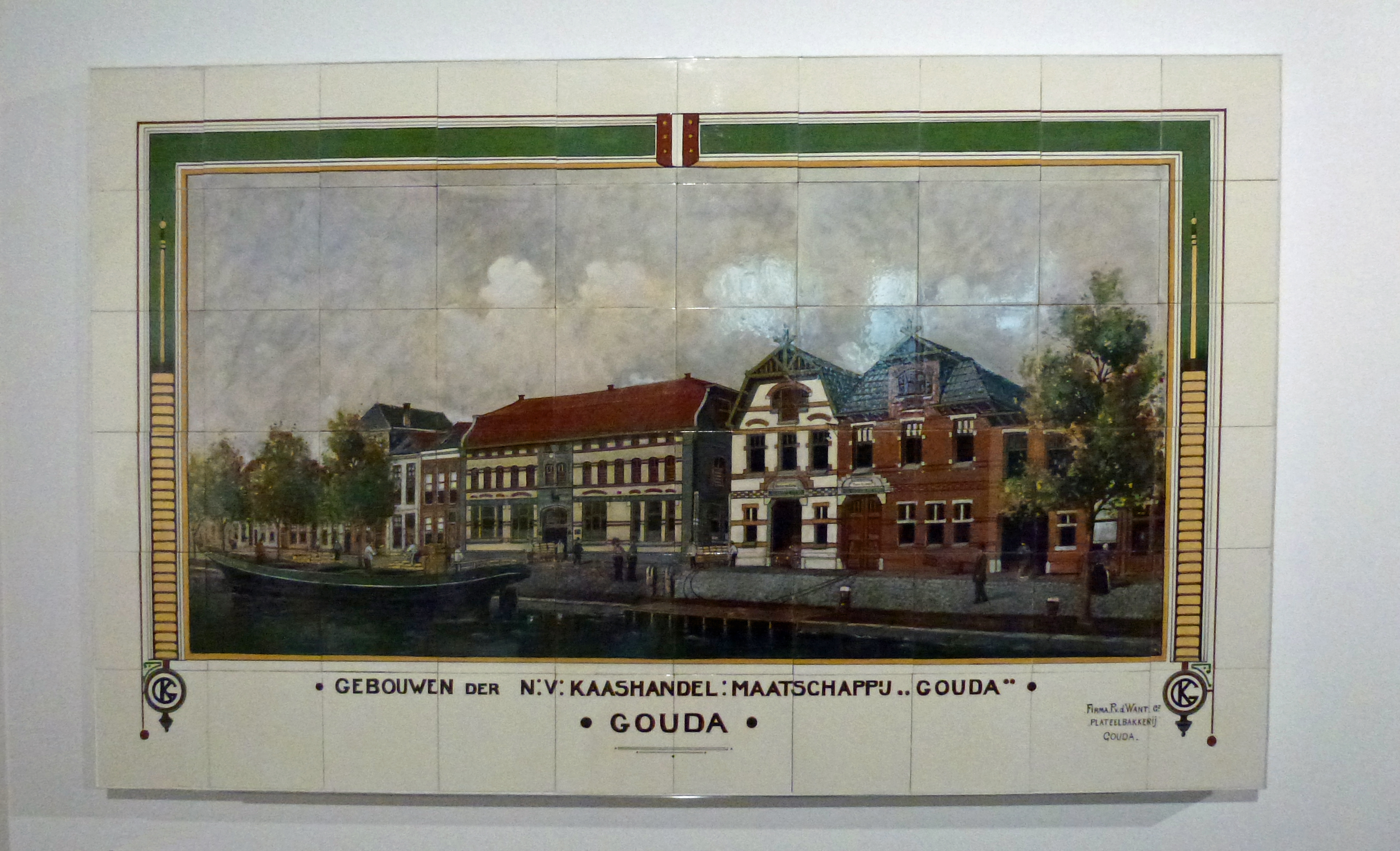 Eigen foto van Tegeltableau NV Kaashandel Mij. Gouda. Voorstellend de Pakhuizen aan de Kattensingel. (1914). Het tableau bestaat uit 160 tegels en is in 2014 gerestaureerd door Atelier van Lookeren. Het tableau behoort tot de collectie van Museum Gouda